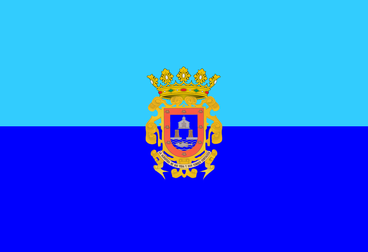 Bandera de San Javier, en Murcia (España)